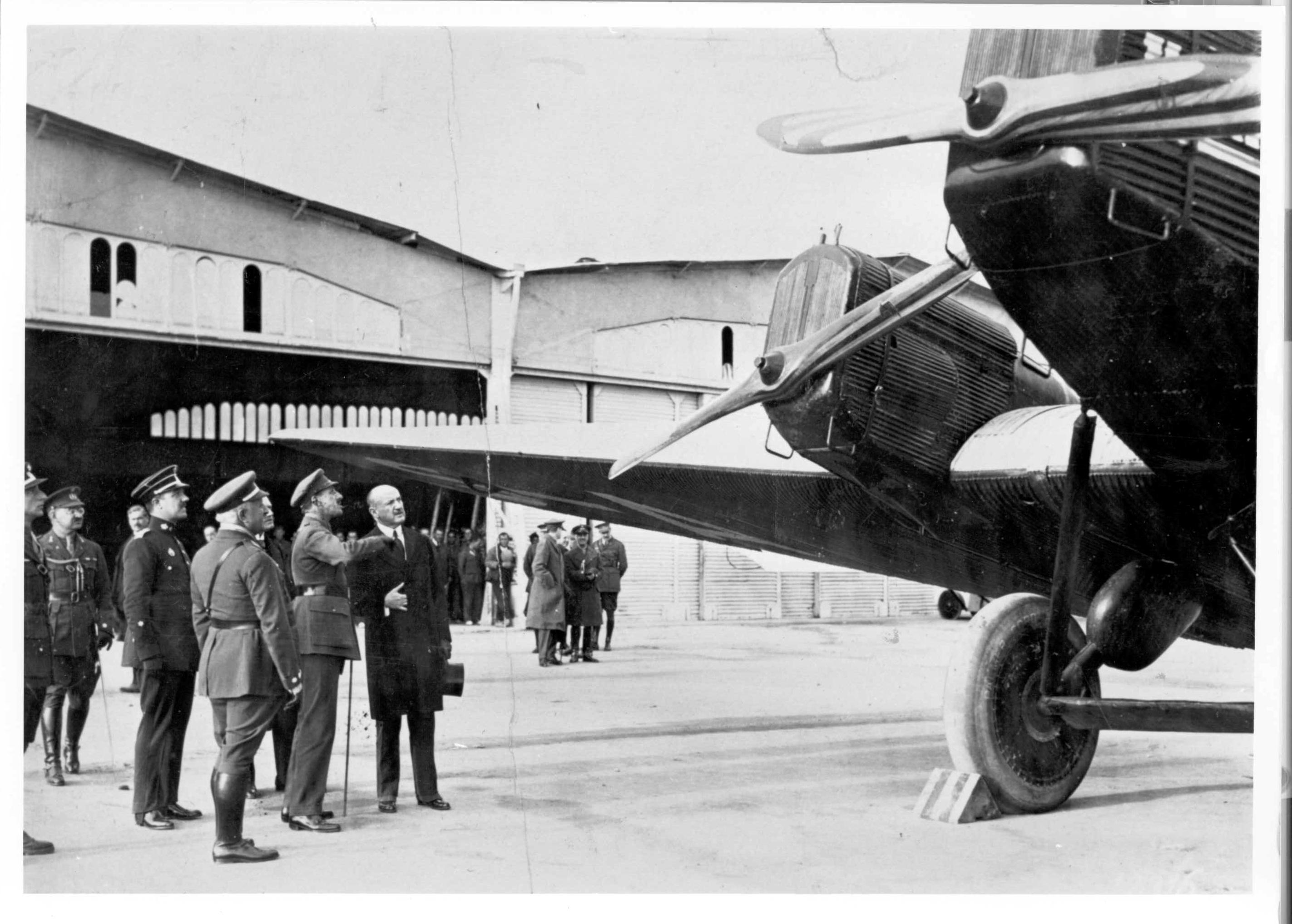 El 13 de abril de 1939 se inauguró la ruta Sevilla-Madrid. Madrid-Seville flight. Inauguration du vol Iberia Madrid-Séville, lors du 13 avril 1939. Inaugurazione del volo Madrid - Siviglia, 13 Aprile 1939 Einweihung der Route Sevilla-Madrid. Am 13. April 1939 wurde die Route von Sevilla nach Madrid eröffnet.